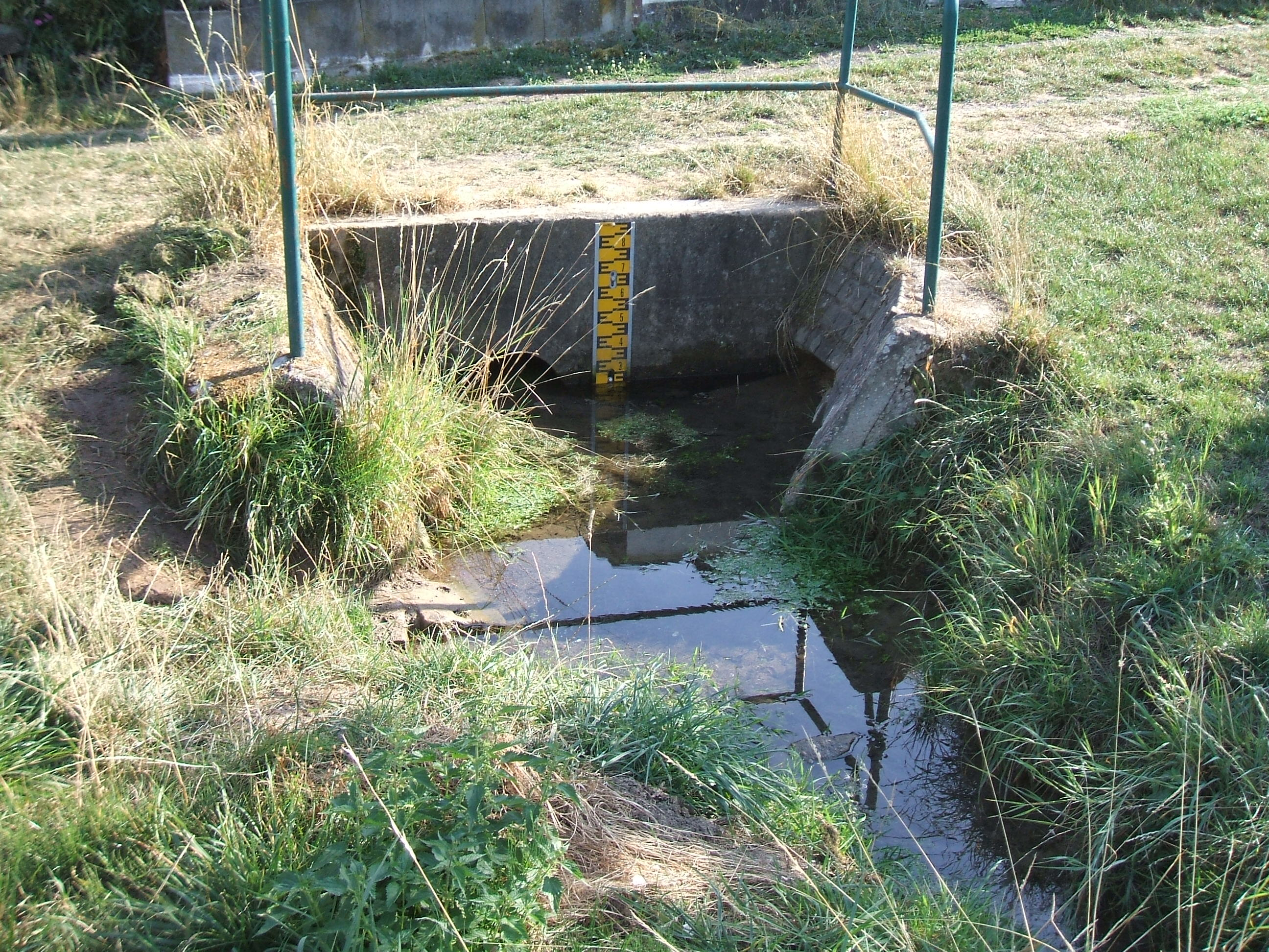 Quelle des Grabens durch den "Fetten Grund" am Nordrand der Ockstädter Bebauung (Bebauungsplan Nr. 08 "Am Pfingstbrunnen") mit Wassersternen. Das Wasser stammt vermutlich vom Ockstädter Pfingstbrunnen.